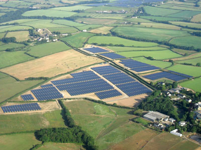 Solarpark North Beer